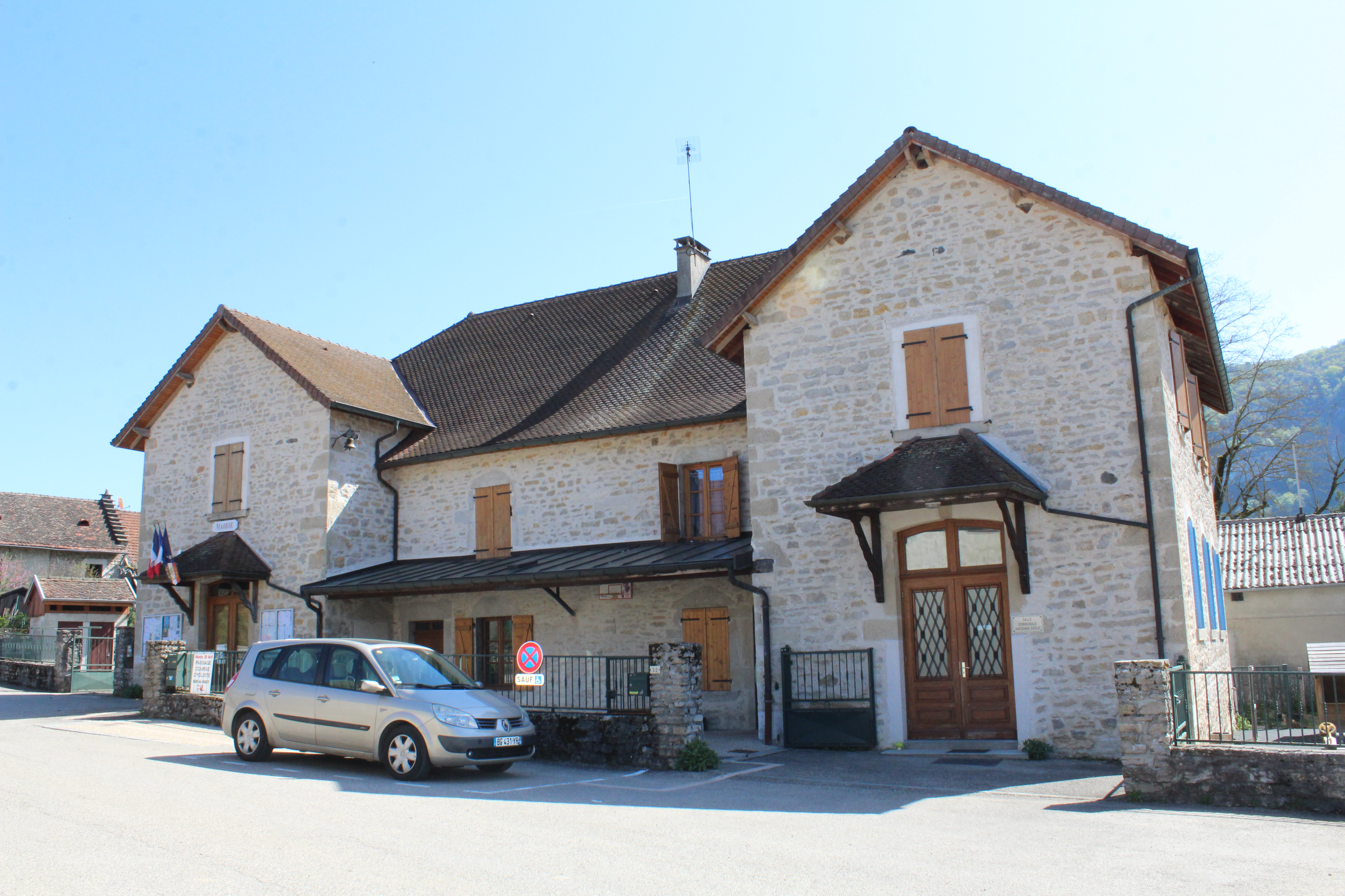 Mairie de Prémeyzel.